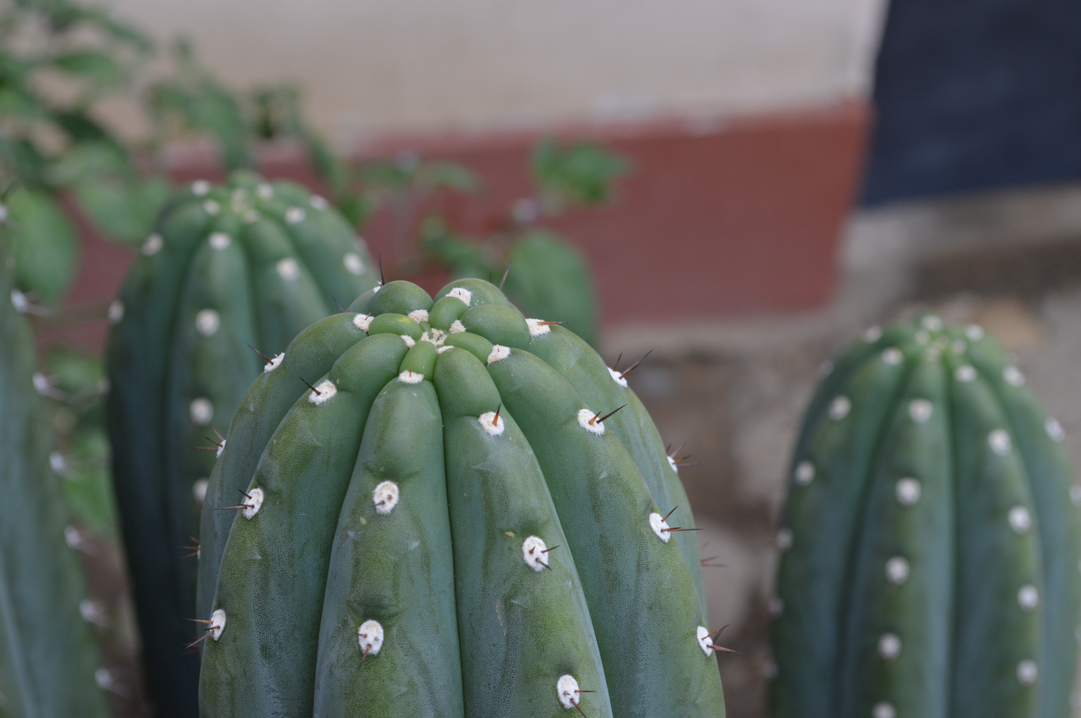 Cactus San Pedro (Echinopsis pachanoi) en Huaraz, noviembre de 2019.